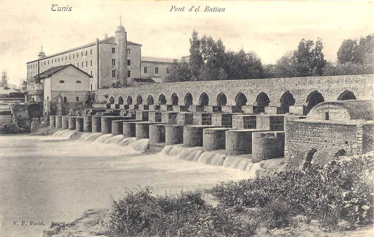 Pont barrage d'El Battan Collection particulière Bertrand Bouret